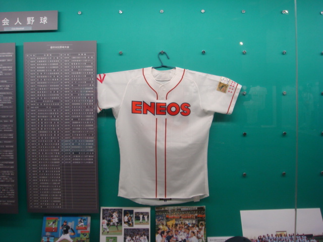 第85回都市対抗野球大会開催中に野球殿堂博物館で撮影したもの（撮影許諾あり）